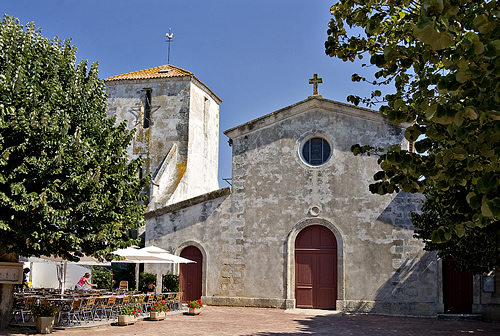 L'Église de Loix - Île de Ré - Photo issue de ma banque d'images